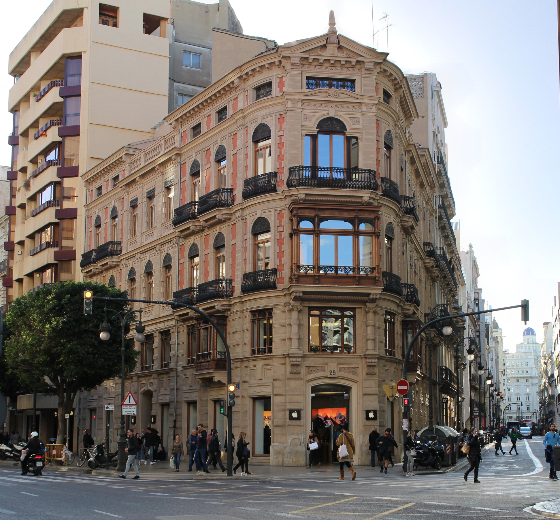 Edificio Ylario (1888) de Lucas García Cardona